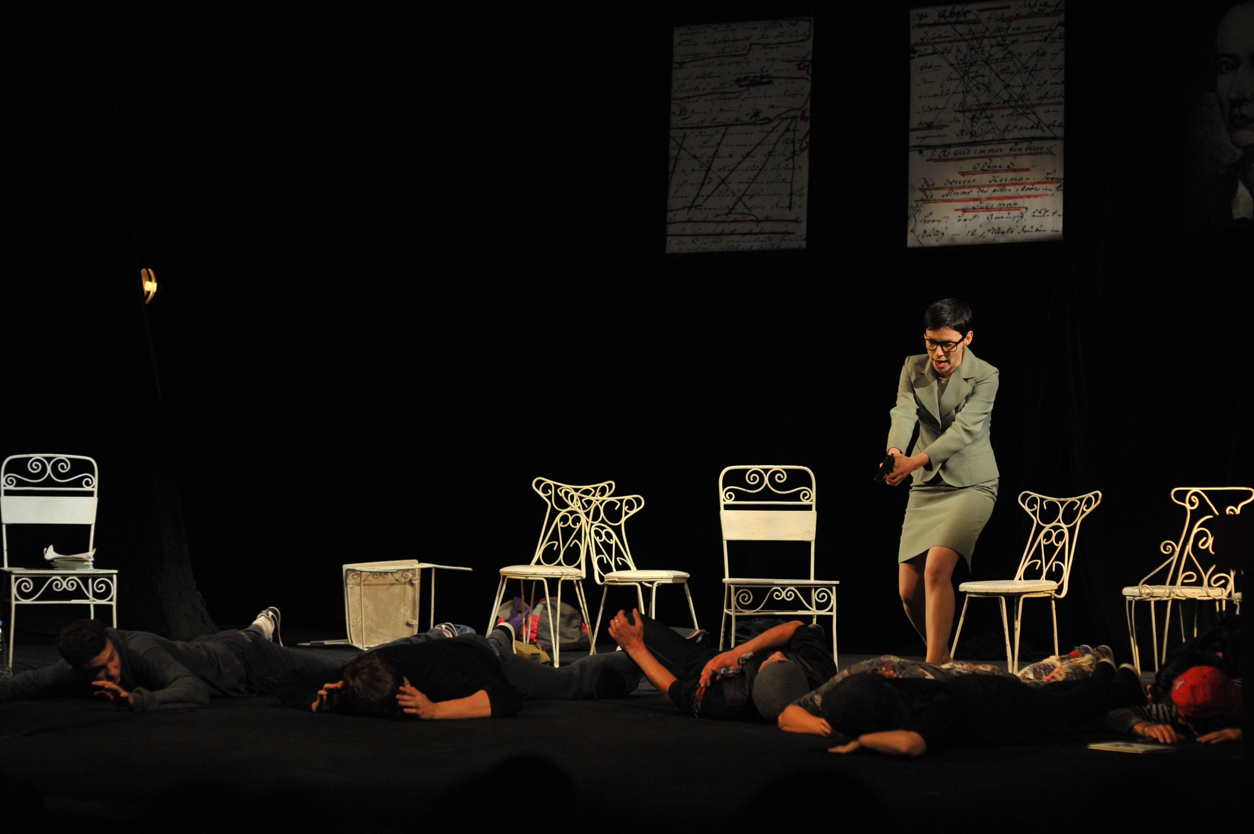 Вистава "Шалена кров" за п’єсою Єнса Гільє, Національний академічний театр російської драми ім. Лесі Українки